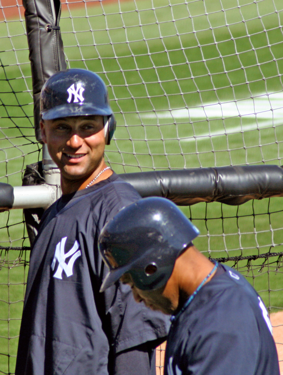 Photograph taken by Googie Man 17:44, 23 November 2007 . . Googie man . . 906×1,200 (928 KB)